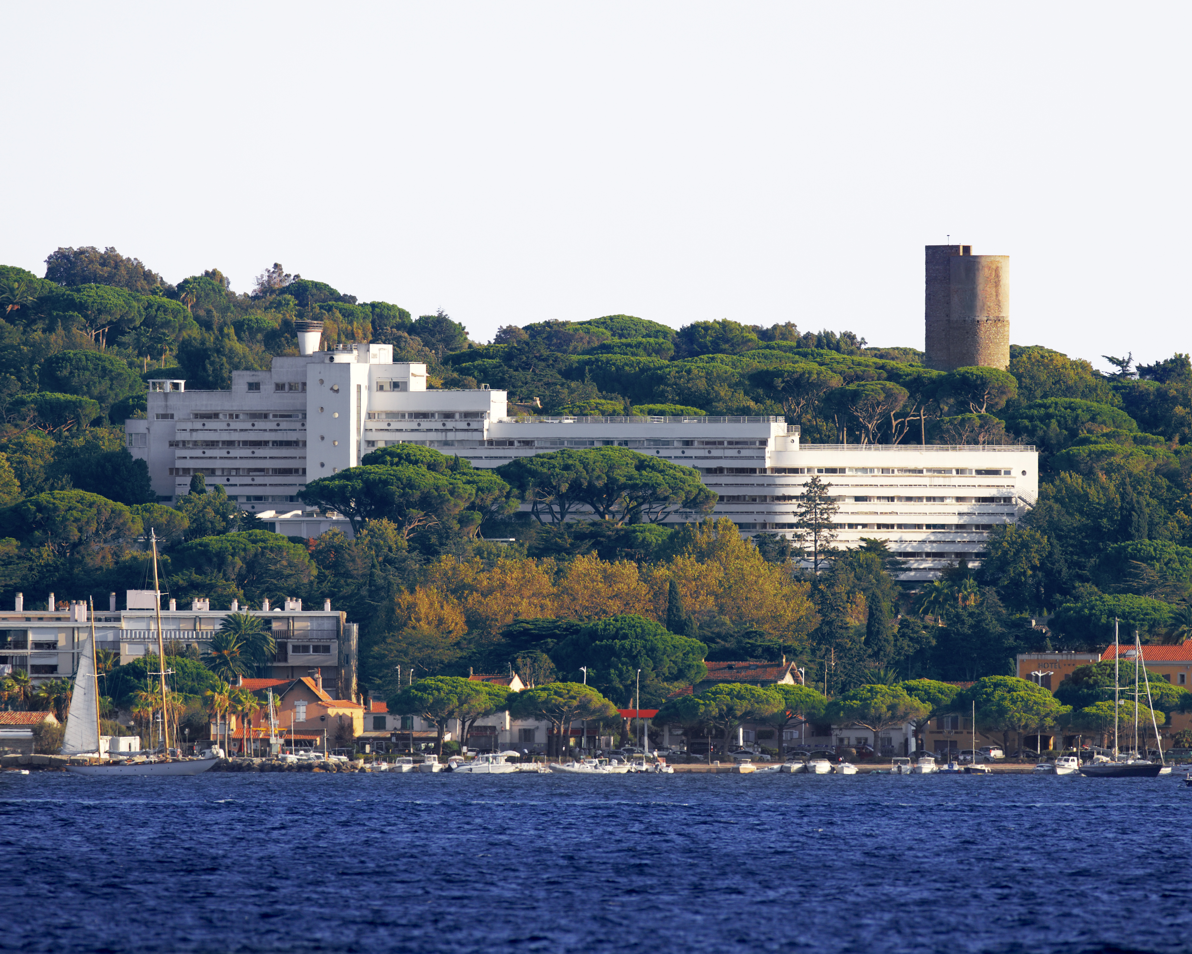 Nordfassade des Latitude 43 von Sait-Maxime fotografiert